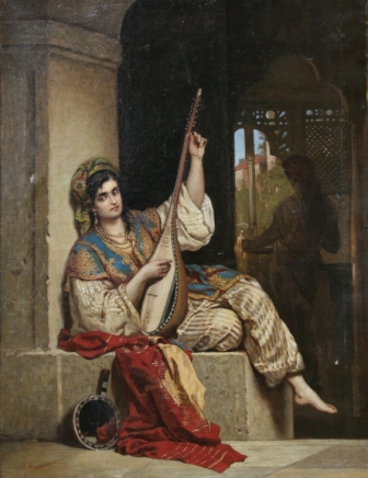 Cântăreaţa cu lăuta.